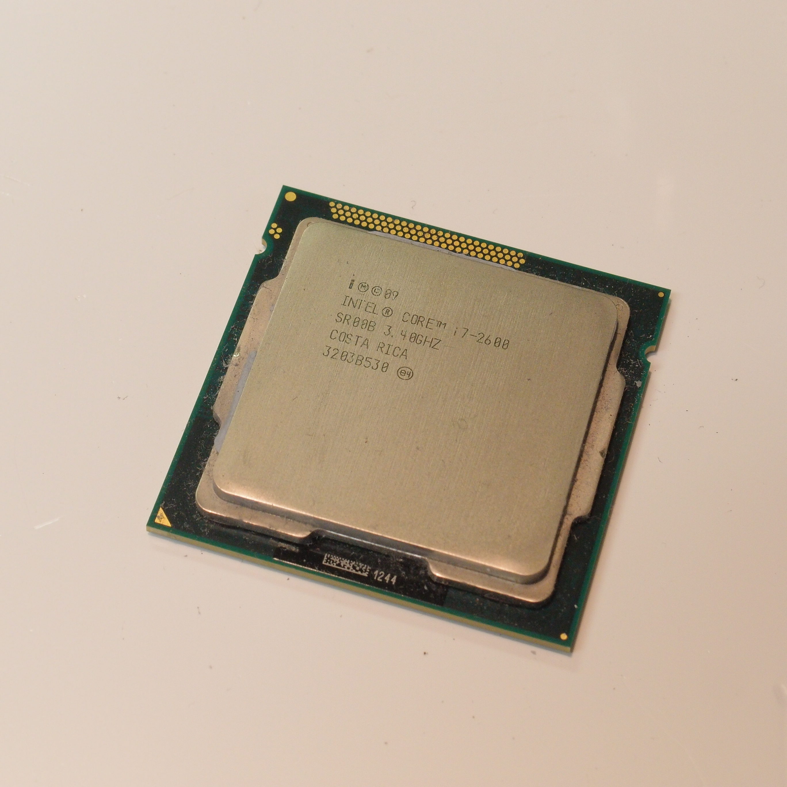 i M C 09 INTEL R CORE TM i7-2600 SR00B 3.40GHZ COSTA RICA 3203B530 E4 1244